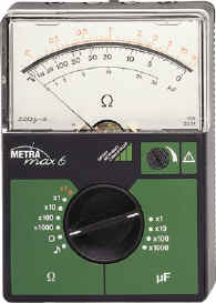 Ohmetro